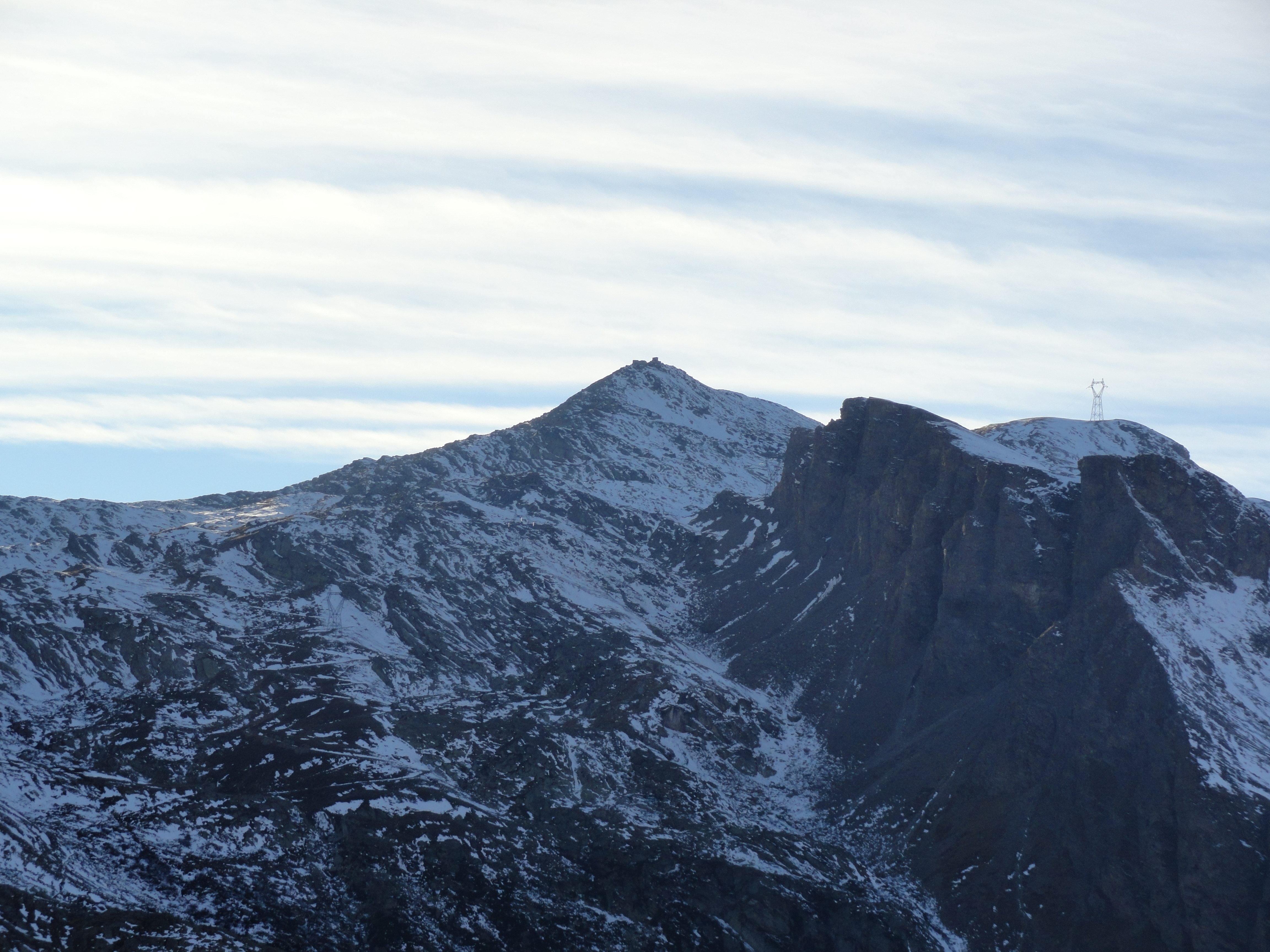 Il Monte Malamot con sulla cima la caserma difensiva vista dalla piana della Batteria Paradiso